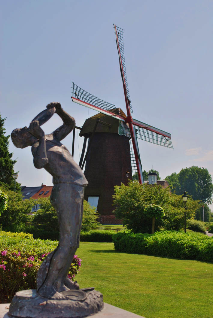 Beeldje van "den Arendonkse telowerelè'er" en de Toremansmolen